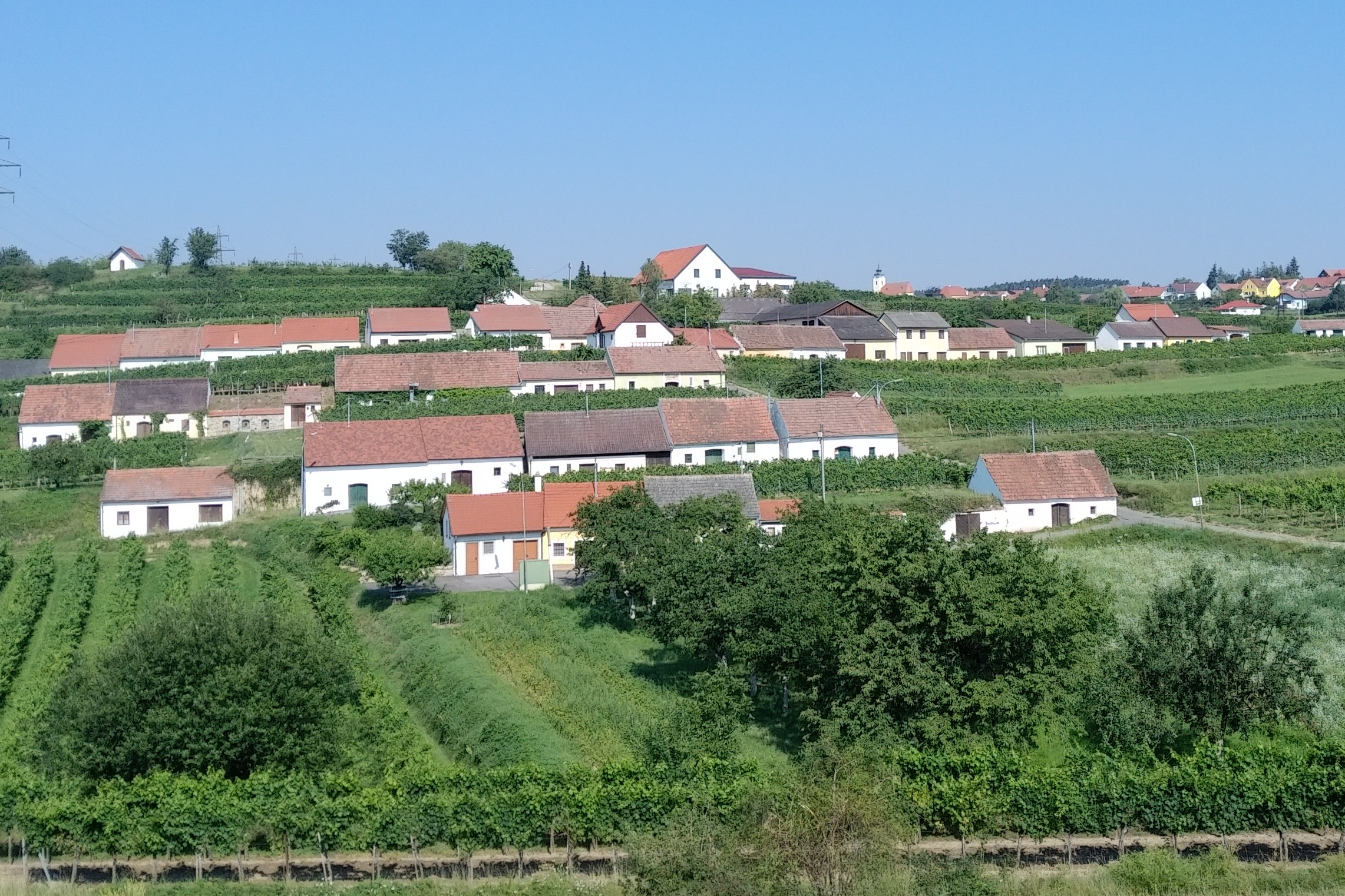 Die Kellergasse von Mittelberg im Südosten des Ortes ist terrassenförmig in mehreren Gassen angelegt.